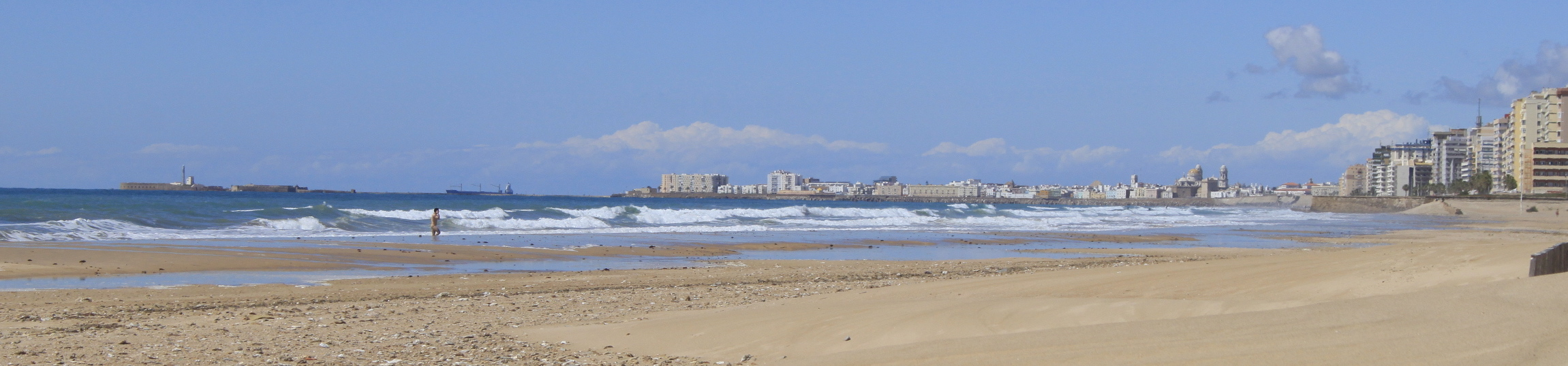 Cortadura.Cadiz.